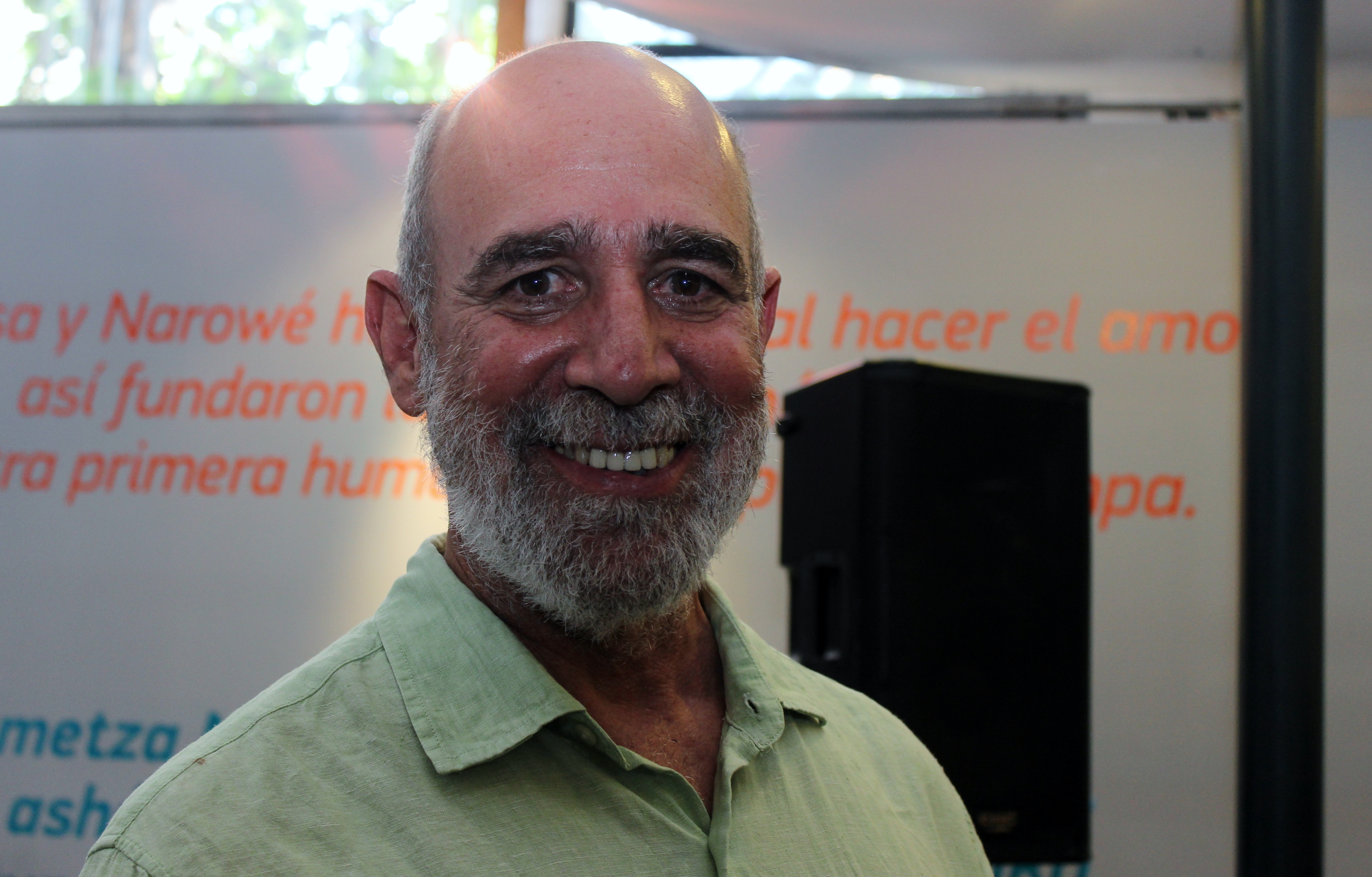 El artista plástico Ricardo Wiesse en la Feria Internacional del Libro de Santiago 2018.